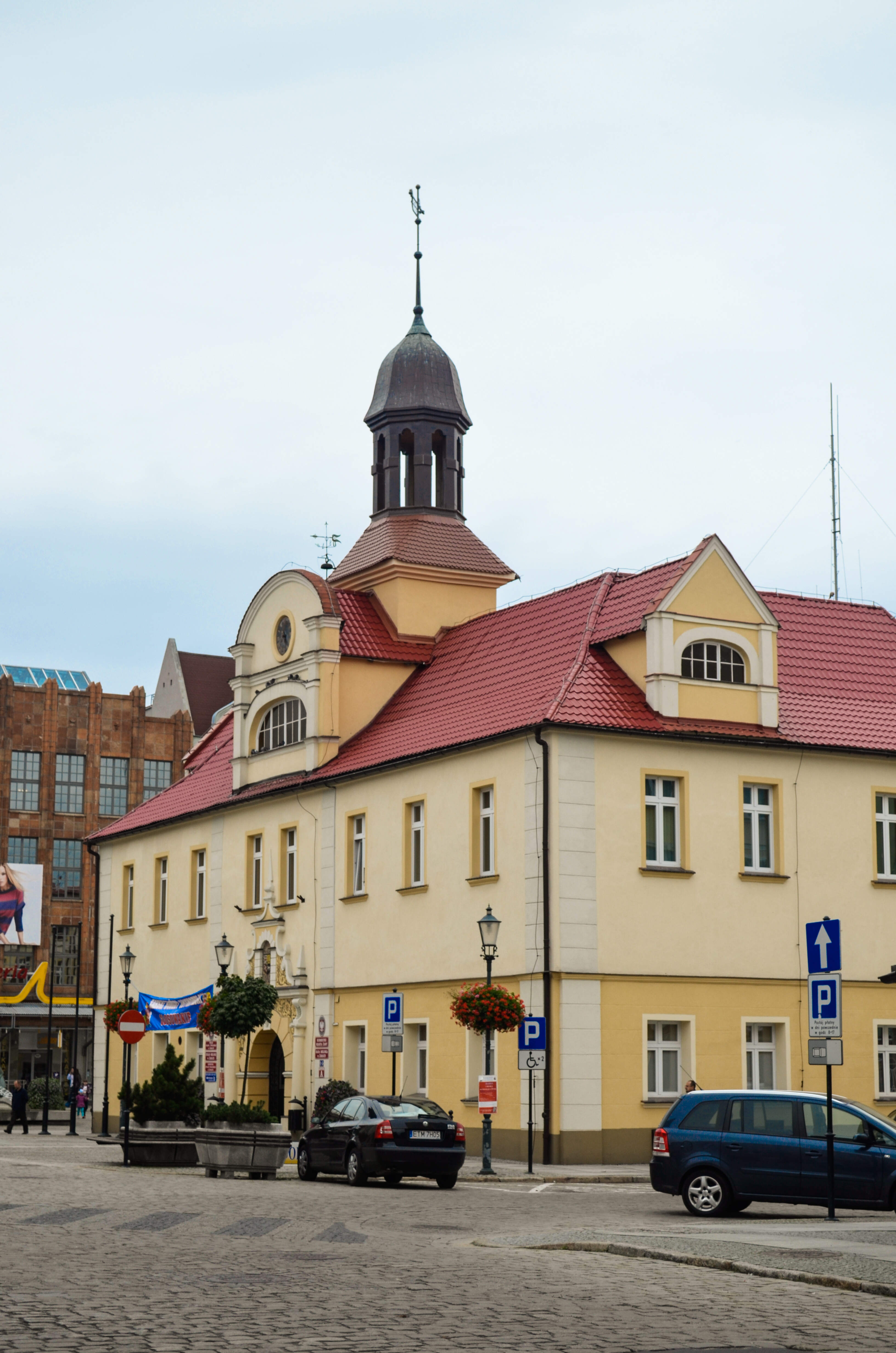 Żary, ratusz, XIV, XVI, XVIII, XX